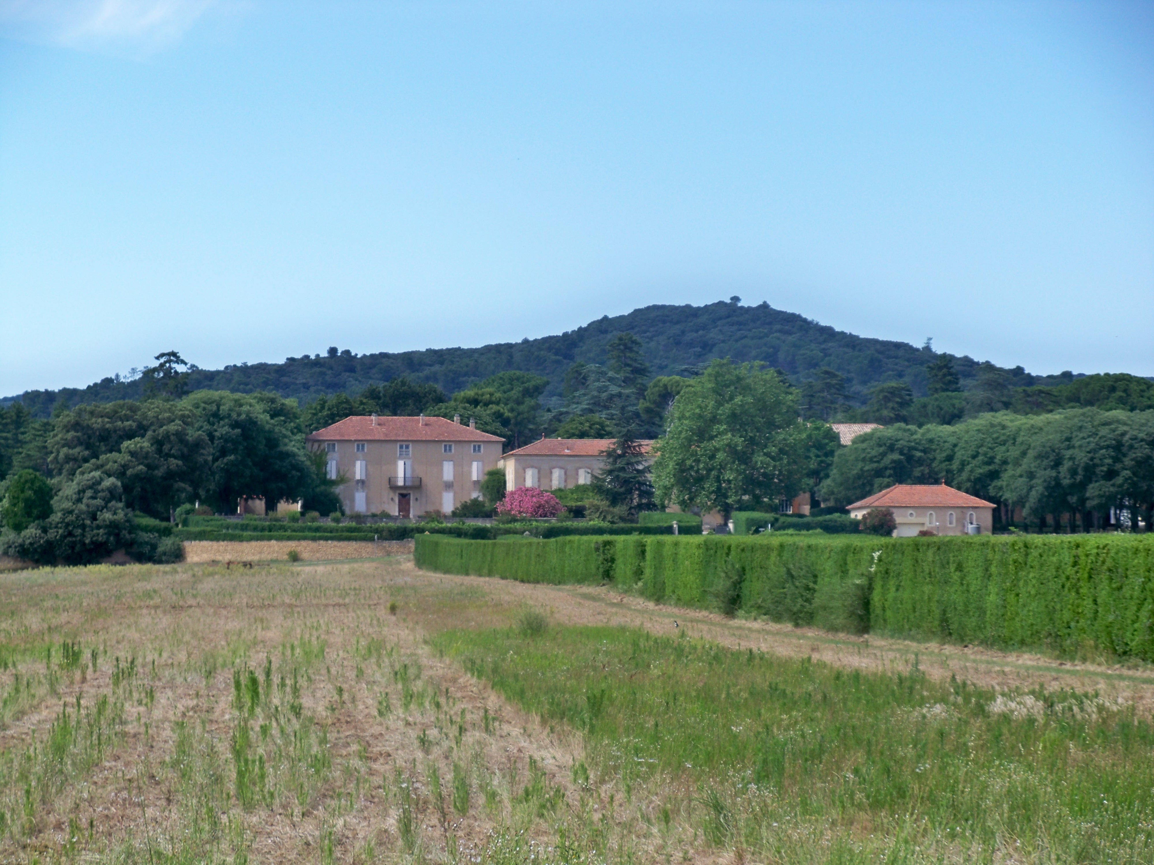 vue générale du Château Saint Estève, AOC Massif d'Uchaux, Vaucluse